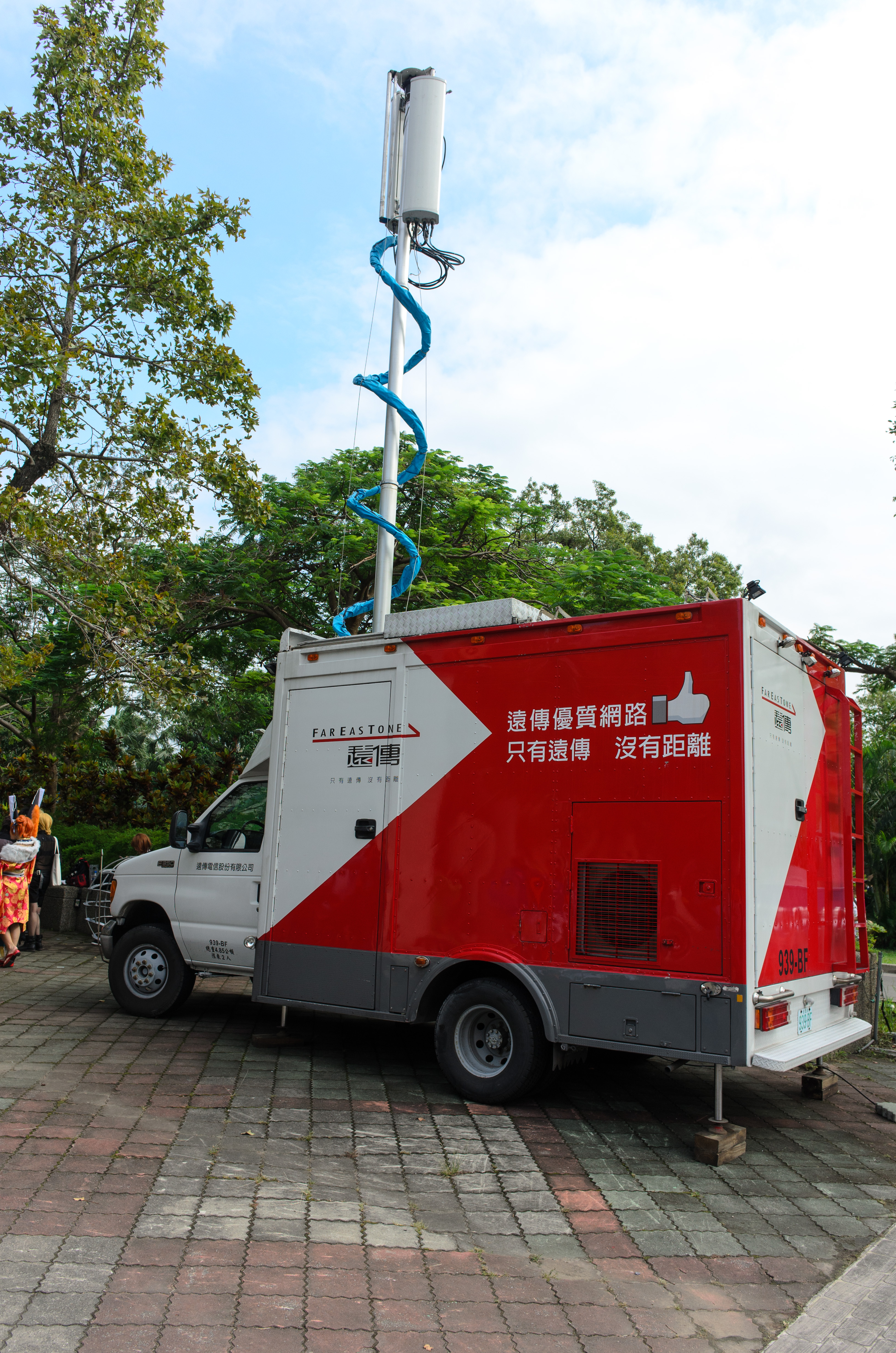 PF23第二日下午，臺大體育館外支援行動通信的遠傳電信福特E-350行動基地臺車939-BF。